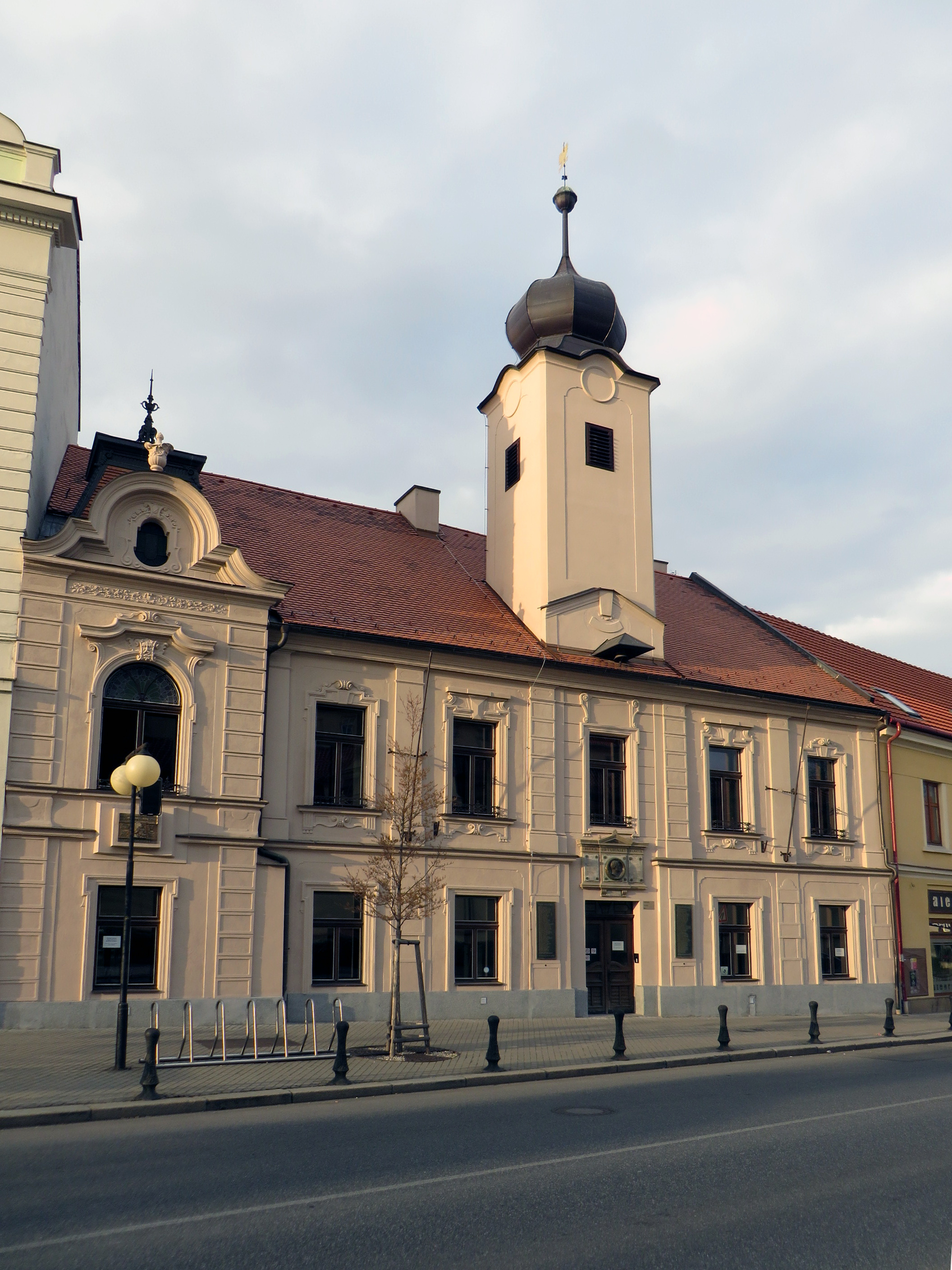 Městská knihovna v Poděbradech (dříve stará radnice). Stav po rekonstrukci. GPS: 50.1424758N, 15.1192469E